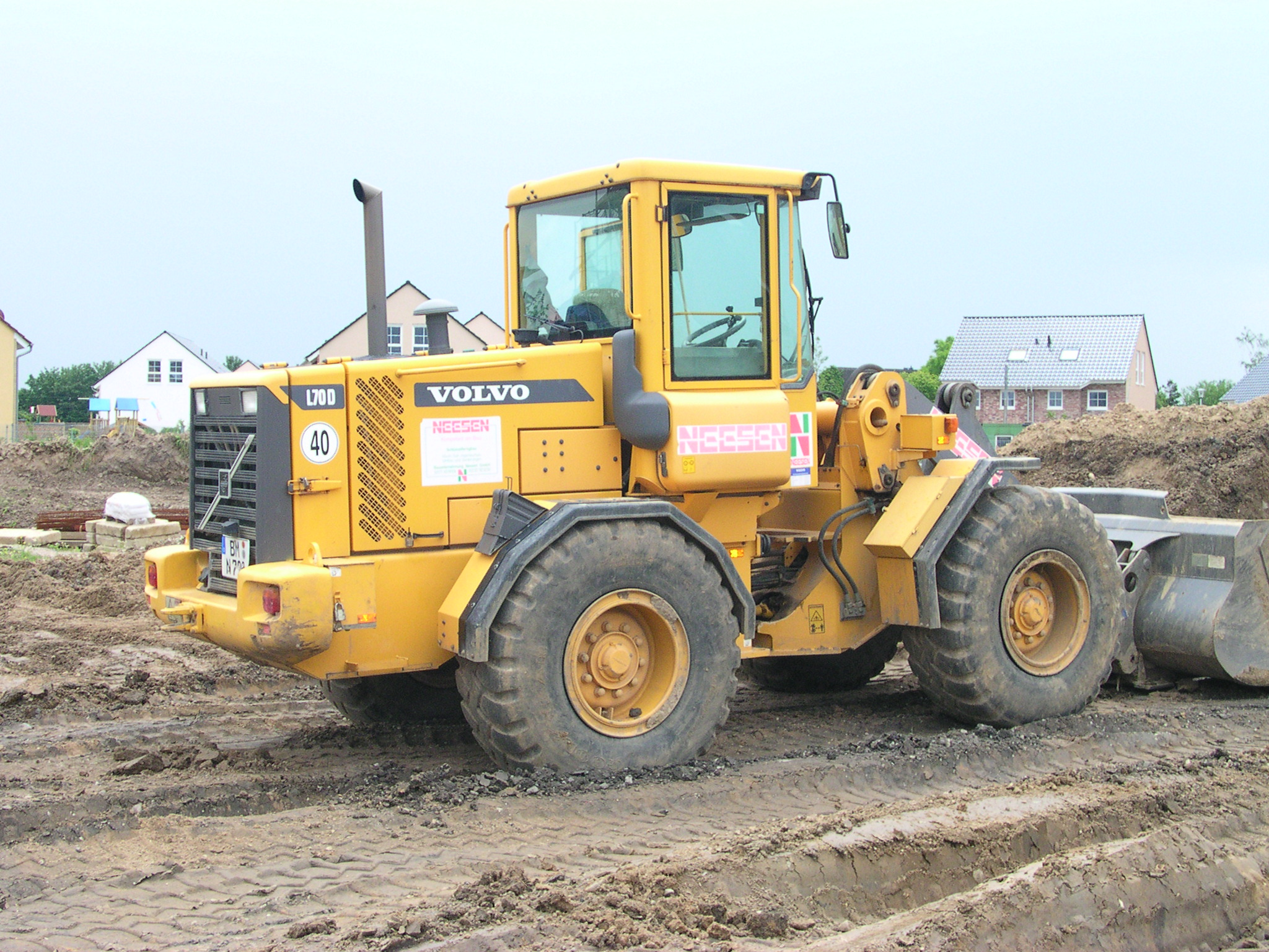 Volvo L70D Radlader